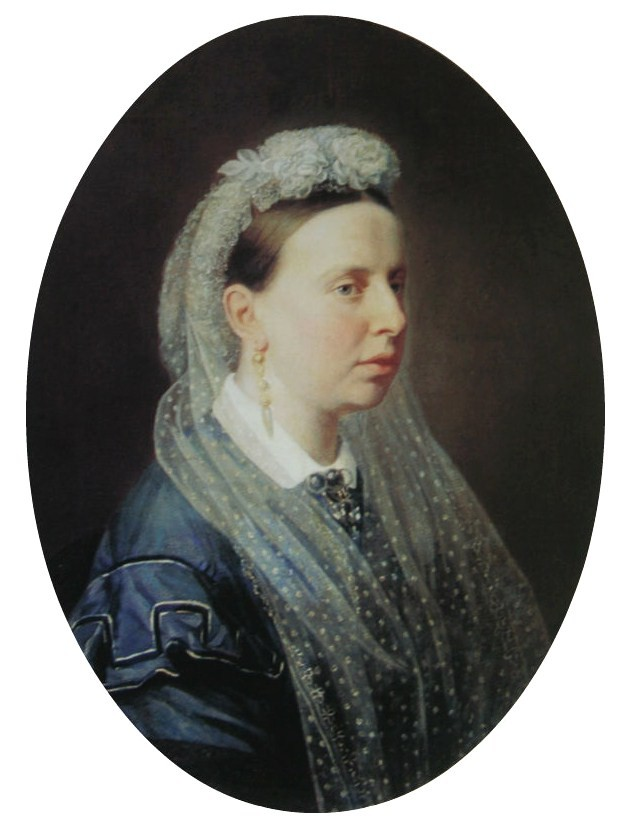 Княгиня Мария Алексеевна Трубецкая, ур. Пещурова (1817—1889), с 1847 года замужем за князем В. А. Трубецким (1825—1880), воронежским губернатором.